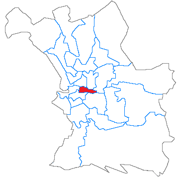 Situation du canton dans la ville de Marseille